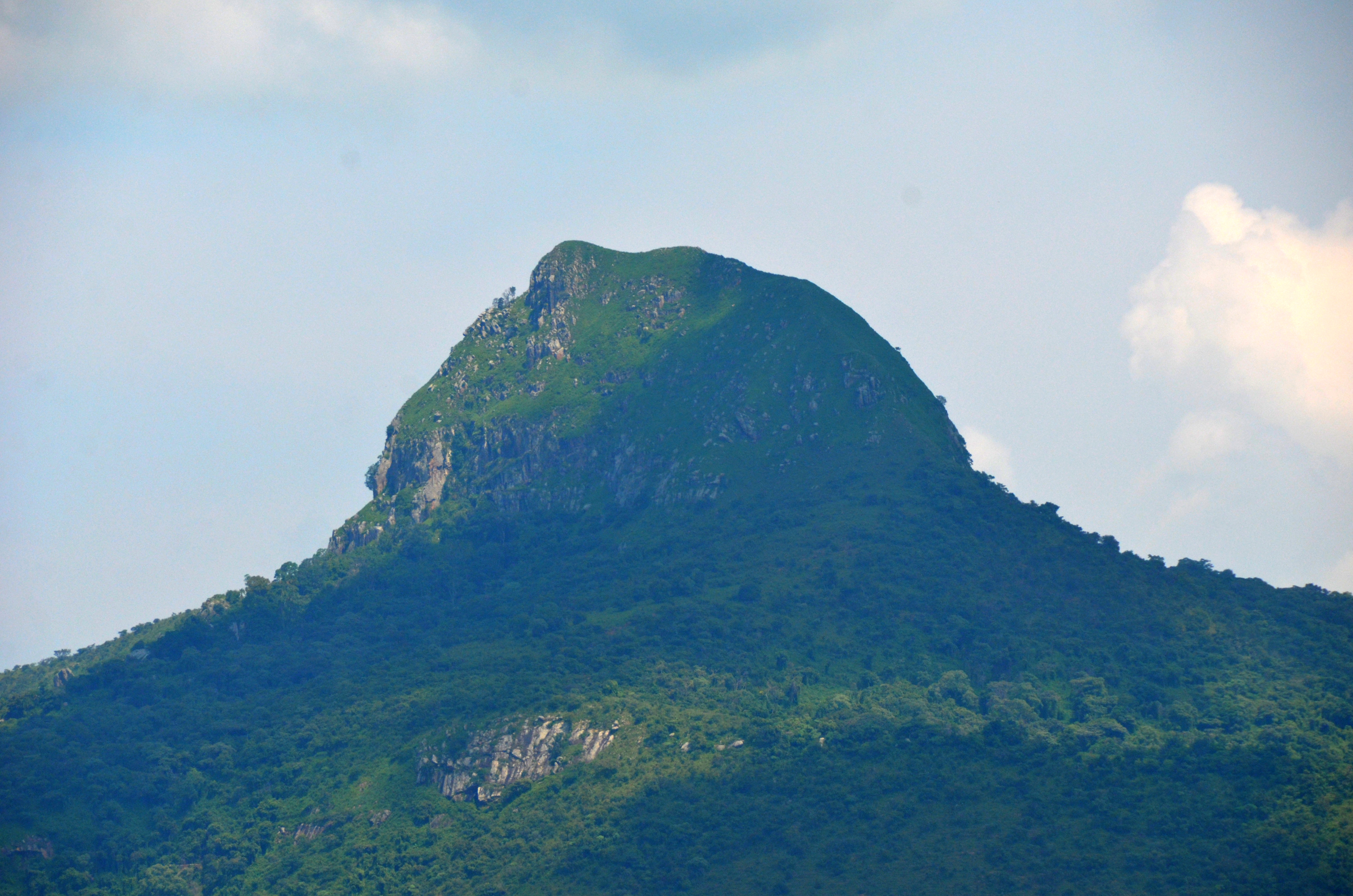 Le mont Mbapit situé en pays Bamoun